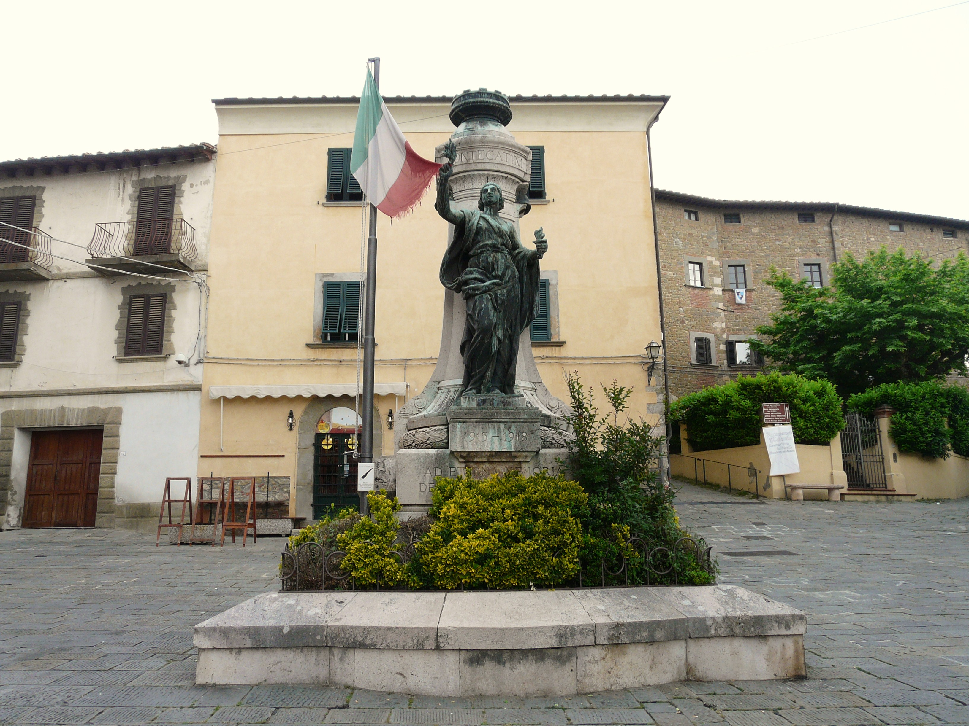 Frazione di Montecatini Alto, Comune di Montecatini Terme, Toscana, Italia